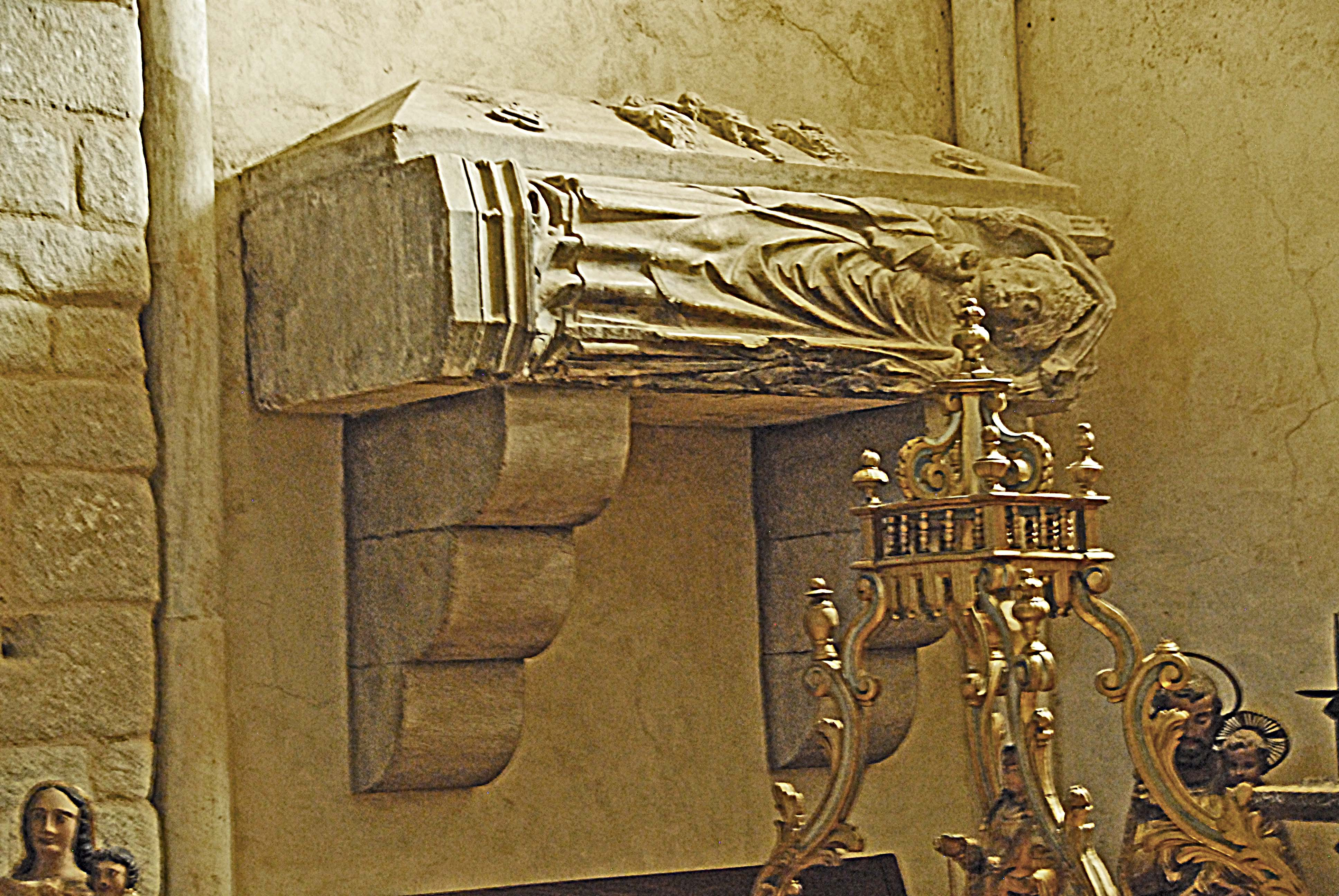 Ste-Eulalie-et-Ste-Julie_d’Elne, Grabmal Bischof Raimund Costa, Südkapelle vor Joch 6